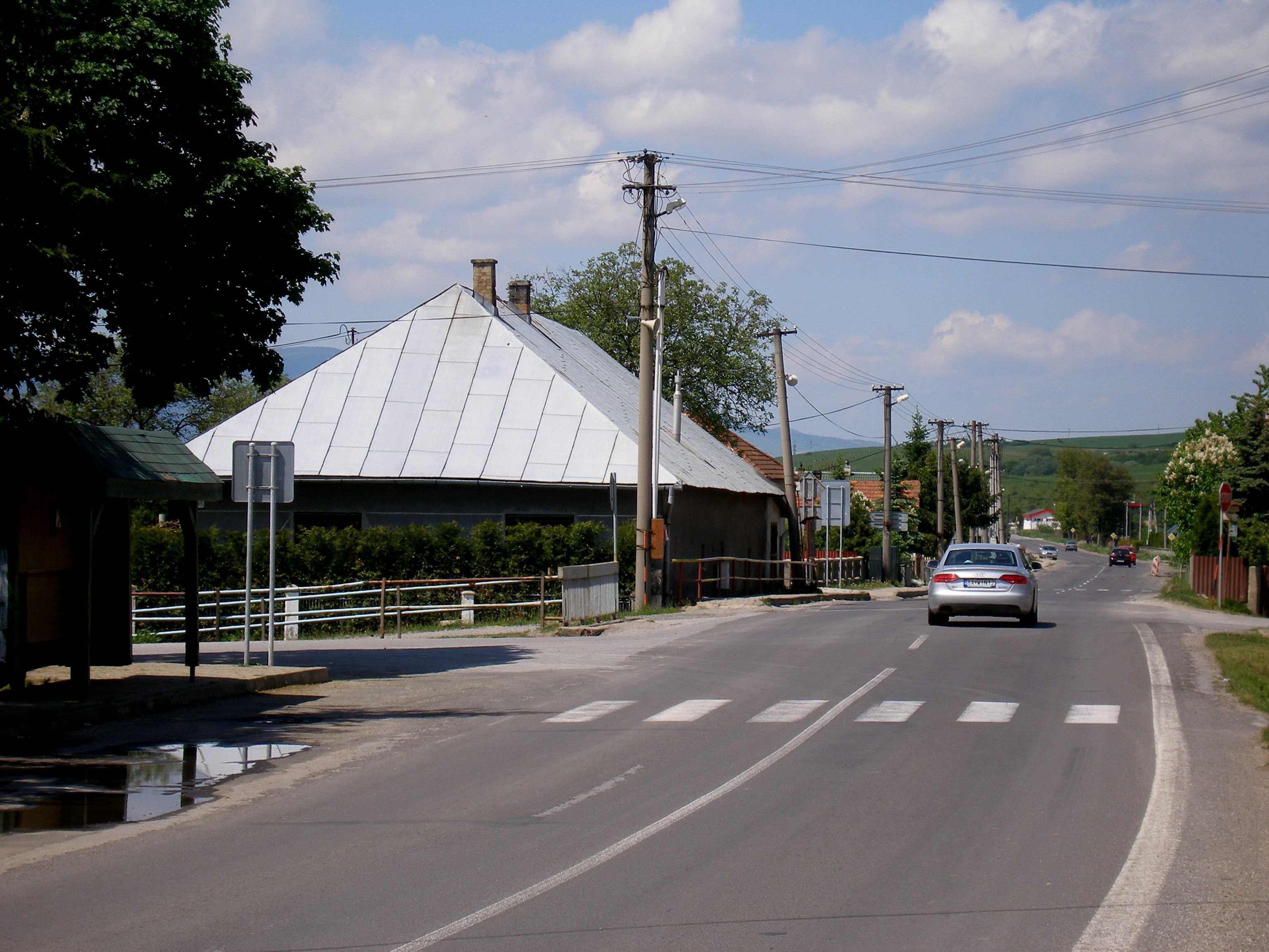 Obec Červenica pri Sabinove, región Šariš.